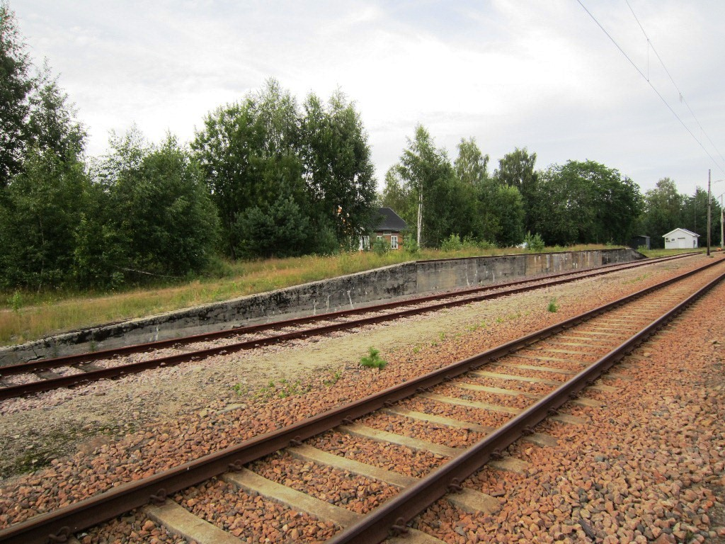 Fidjetun stasjonsområde i 2011